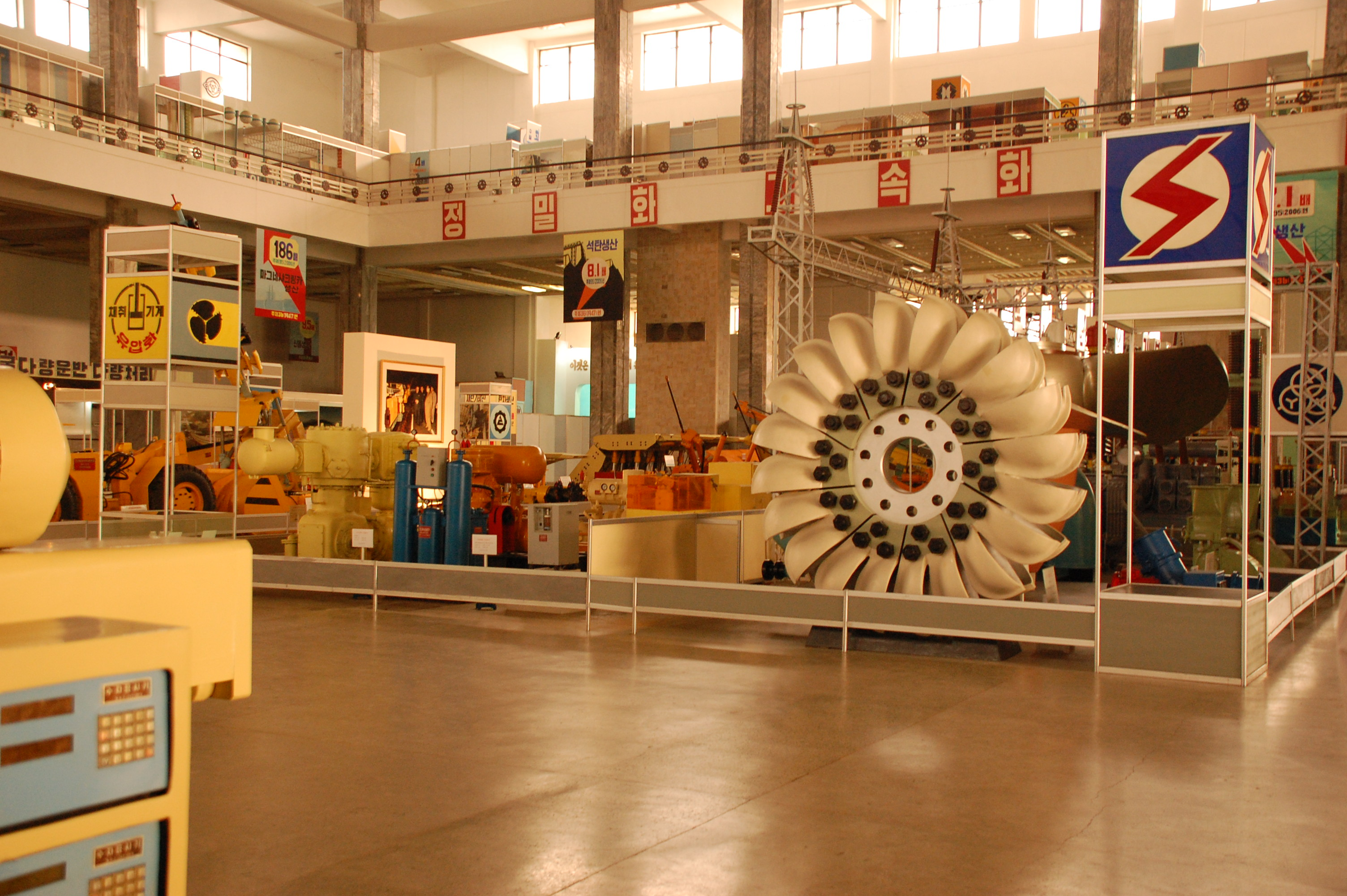 North Korea — Pyongyang